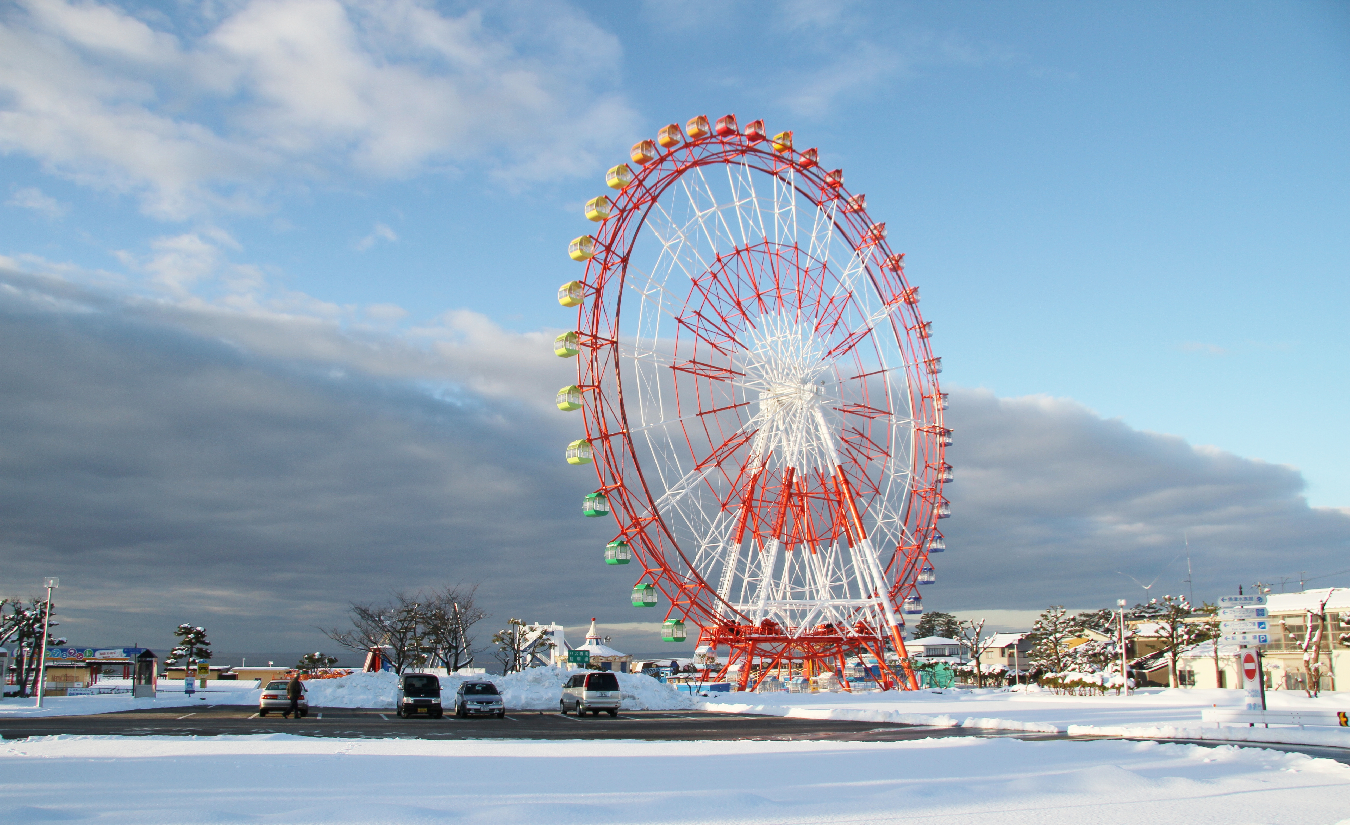 Mirage Land